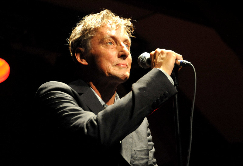 Allain Leprest au Festival de Fay sur lignon (43) en aout 2010